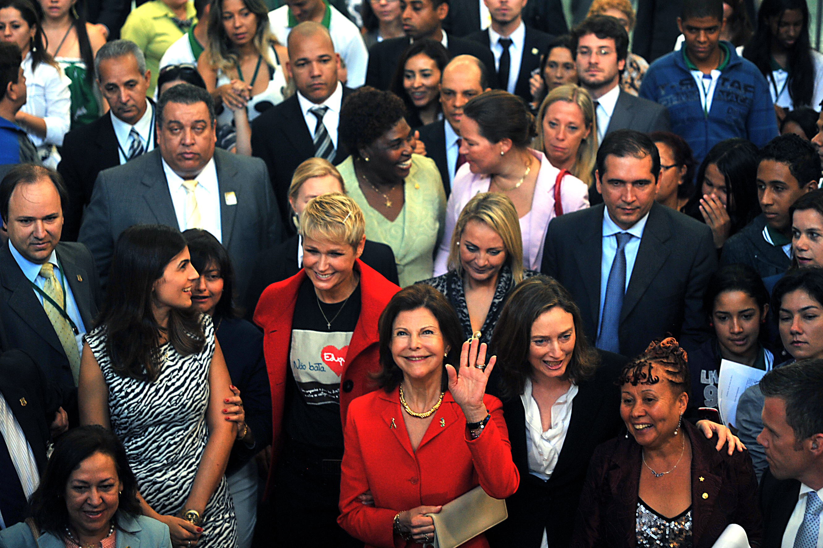 A rainha Silvia, da Suécia, e a apresentadora Xuxa Meneghel, participam de Seminário sobre Experiências de Legislação Contra Castigos Corporais de Crianças e Adolescentes